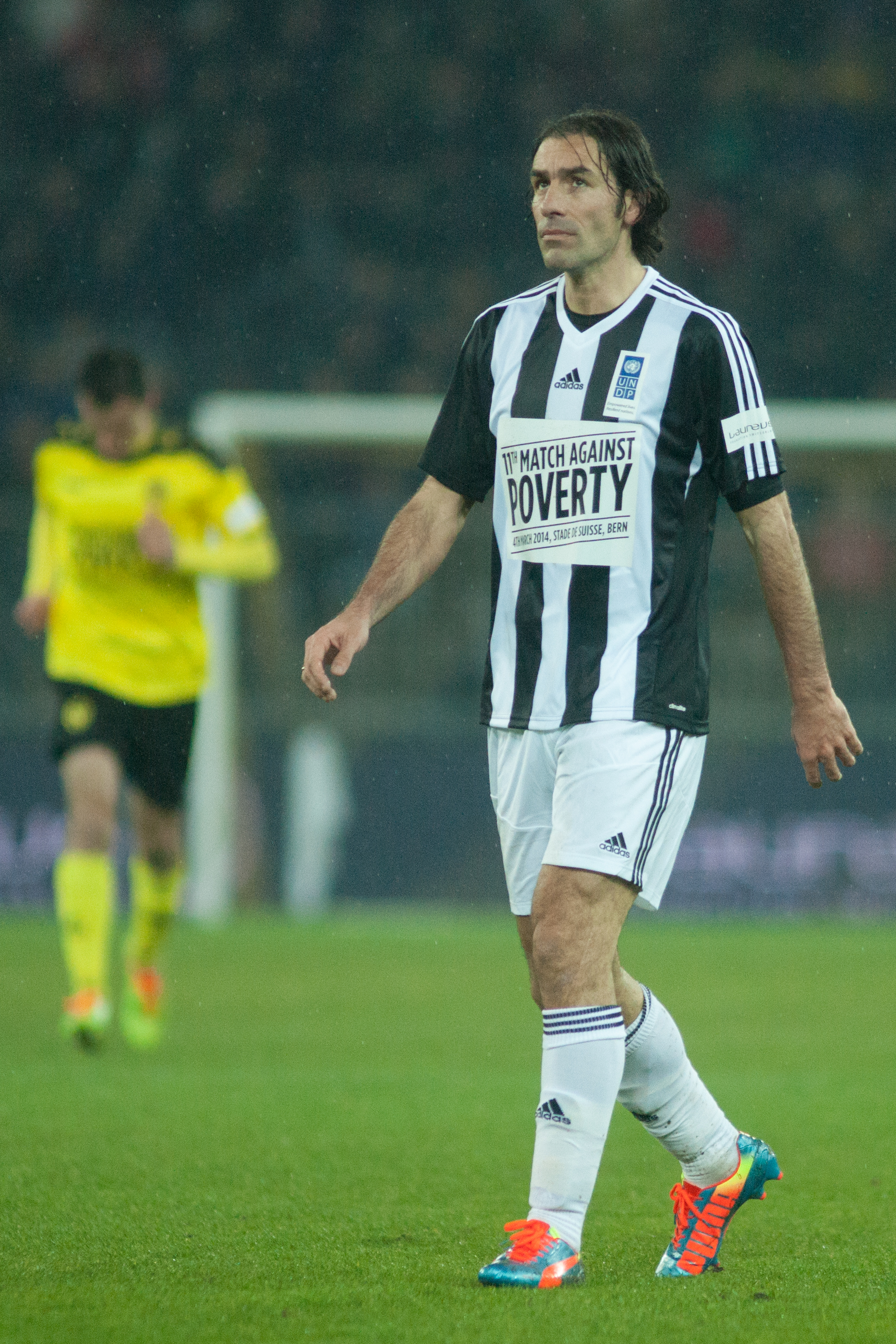 Football against poverty 2014 - Robert Pires